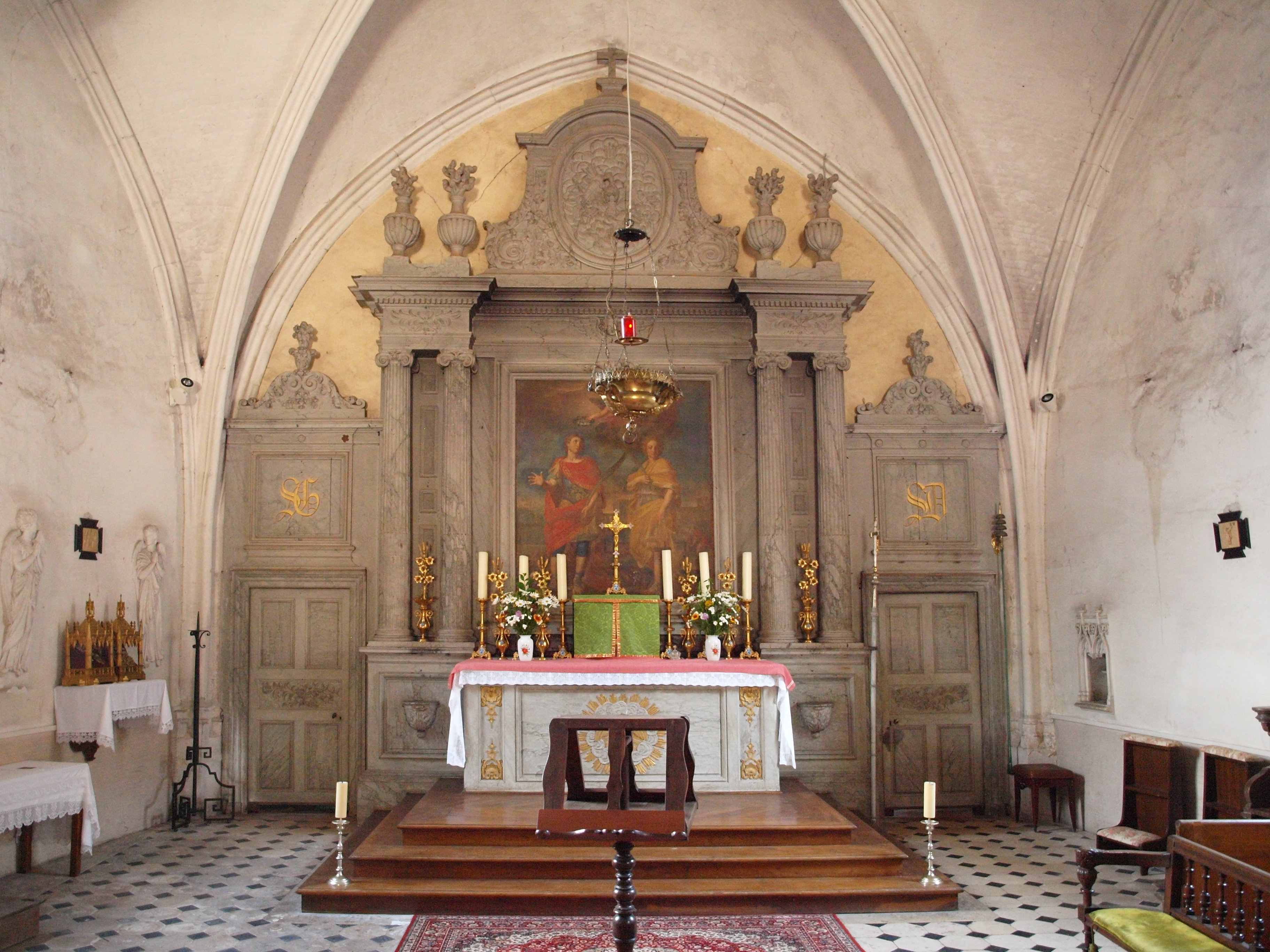 Véron (Yonne, France) ; église de Saint-Gorgon-et-Saint-Dorothée.